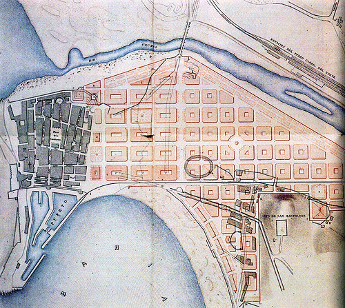 Antonio Kortazarren proposamena Donostiako zabalgunerako.